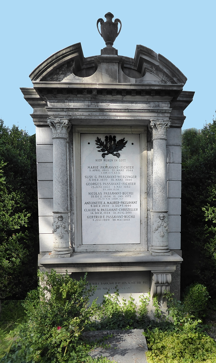 Georges Passavant (1862-1952), Reisender Fotograf, Strafricher und Bankie, Grab auf dem Friedhof Wolfgottesacker, Basel